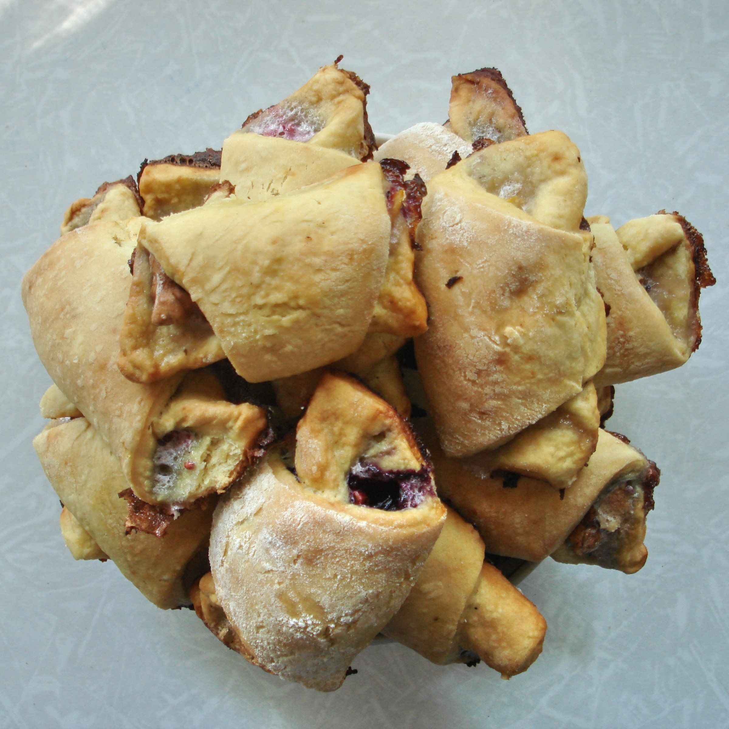 Рогалики с вареньем, Молдавская кухня